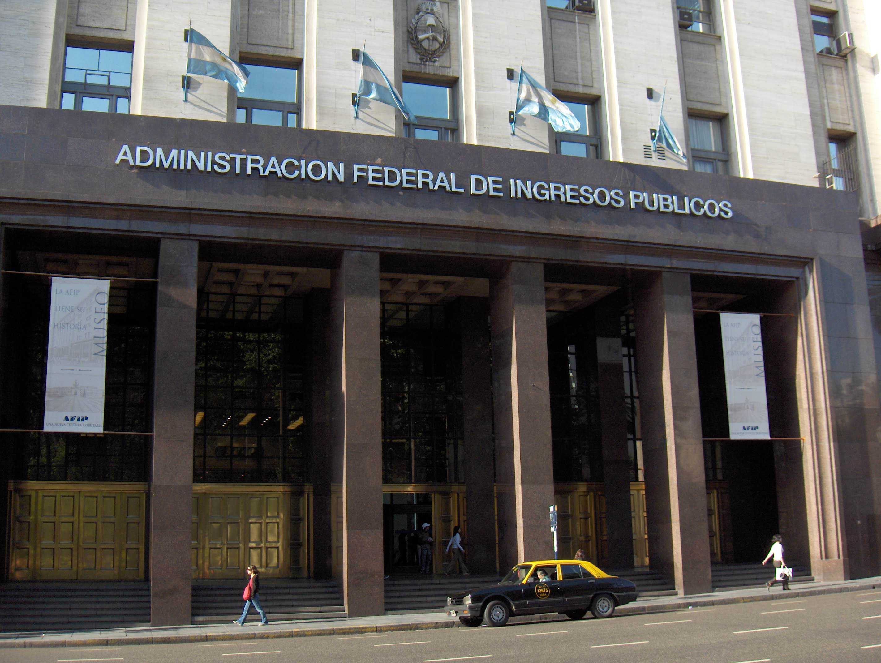 Edificio de la AFIP, Ciudad Buenos Aires, Argentina.